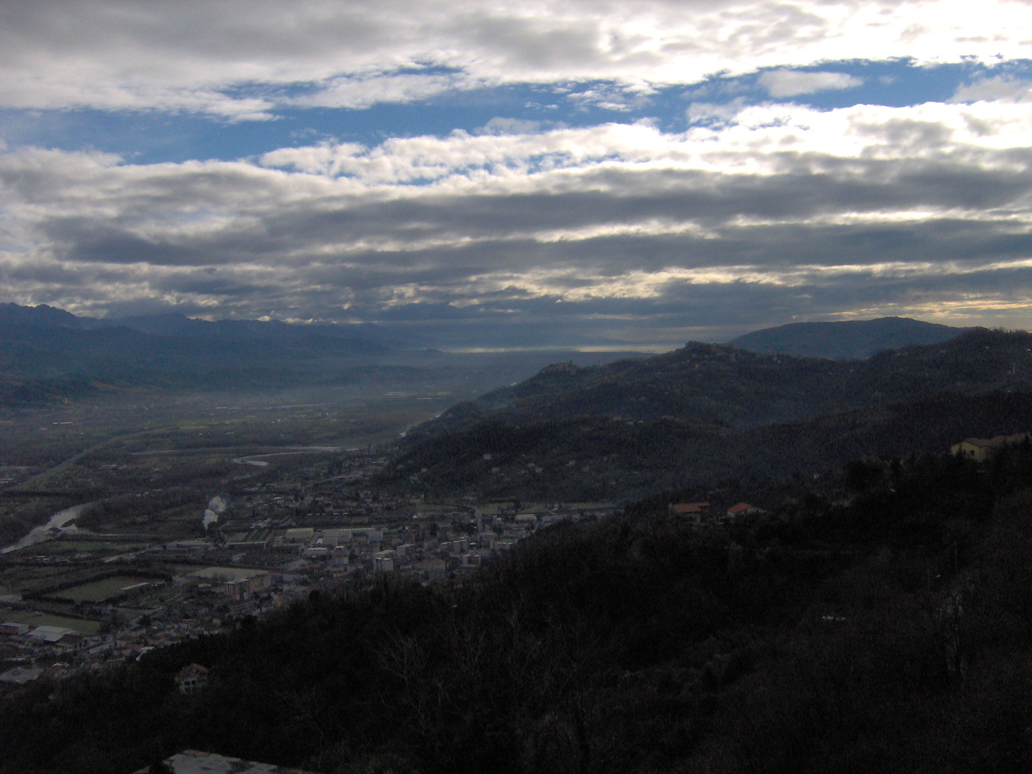 foto provincia spezia